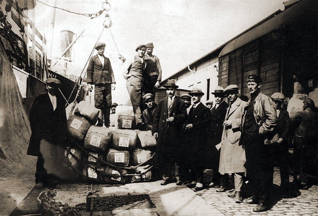 Stückgut Verladung von Dampfer auf Waggon, im Hafen von Varna 1920